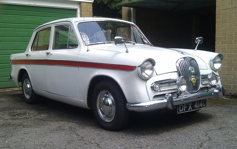 1965 Singer Gazelle Series V